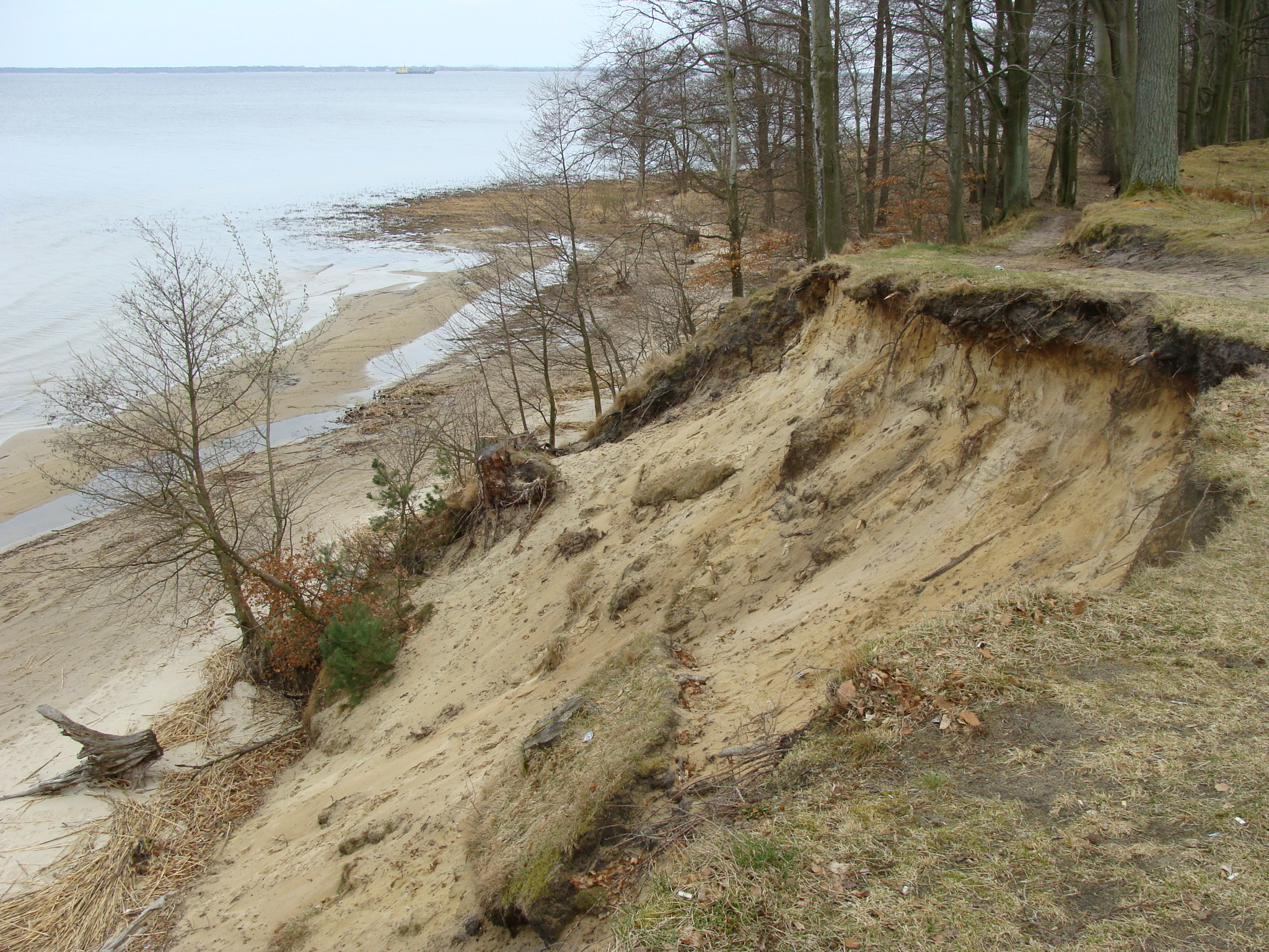 Urwisko między Brzózkami i Trzebieżą